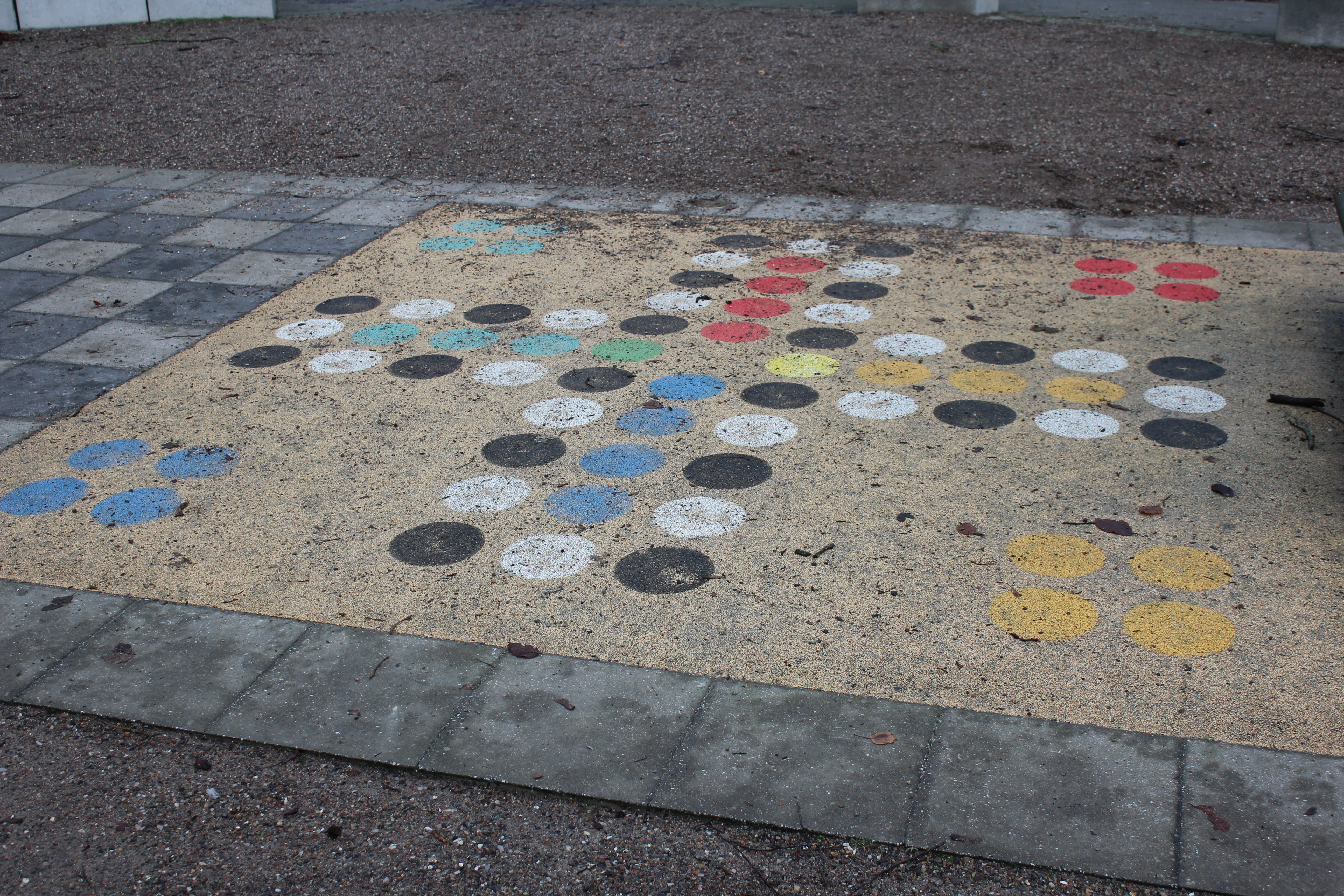 Mensch ärgere Dich nicht Feld auf dem Spielplatz Süderlücke (Flensburg-Mürwik)